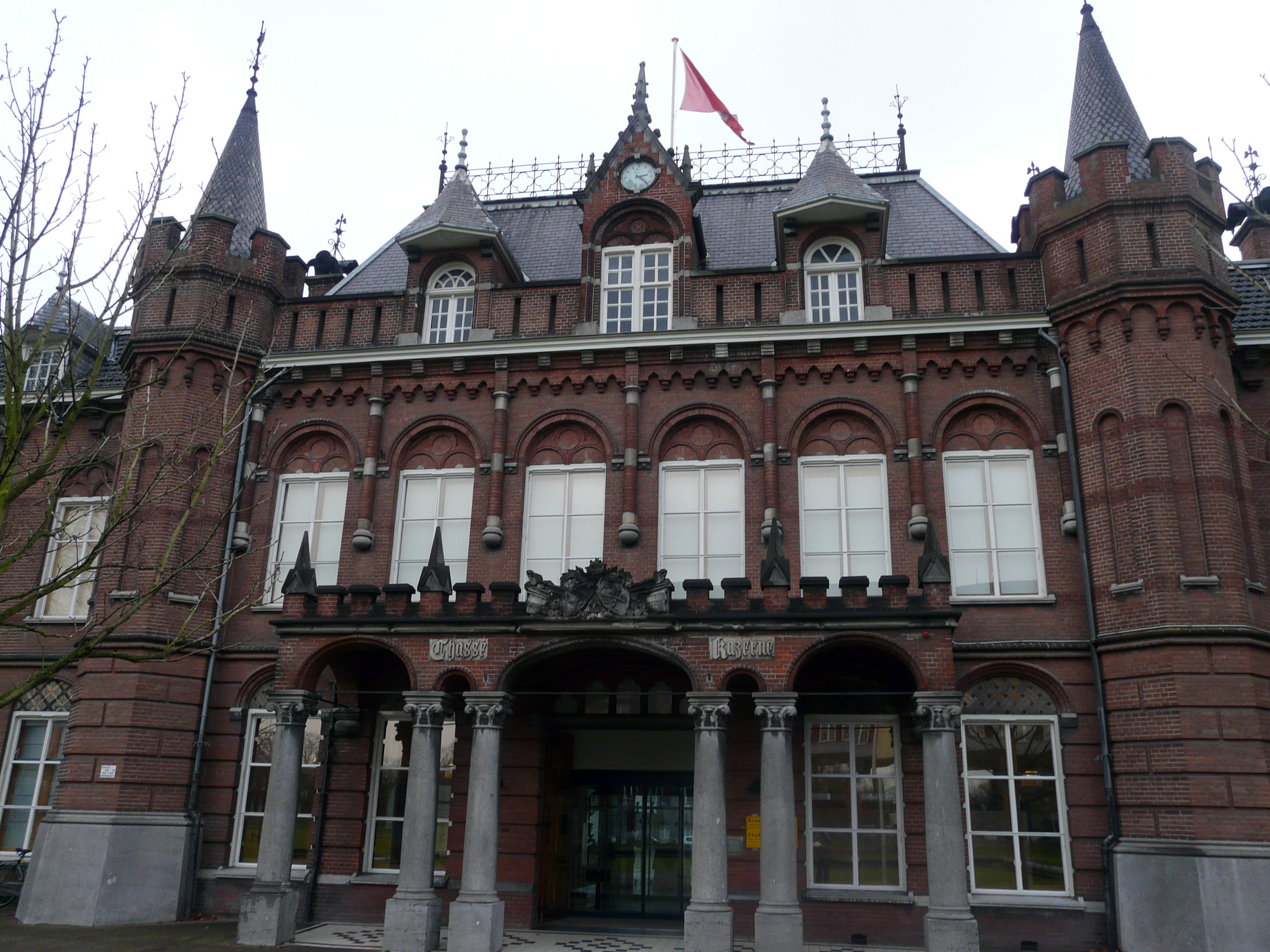 Zicht op een deel van de entree van de voormalige Chassekazerne gevestigd aan de Parade 12-14 in het centrum van Breda. Nu is er nog gevestigd het Stadsarchief Breda. Voorheen ook het Breda's Museum, later Stedelijk Museum Breda genoemd